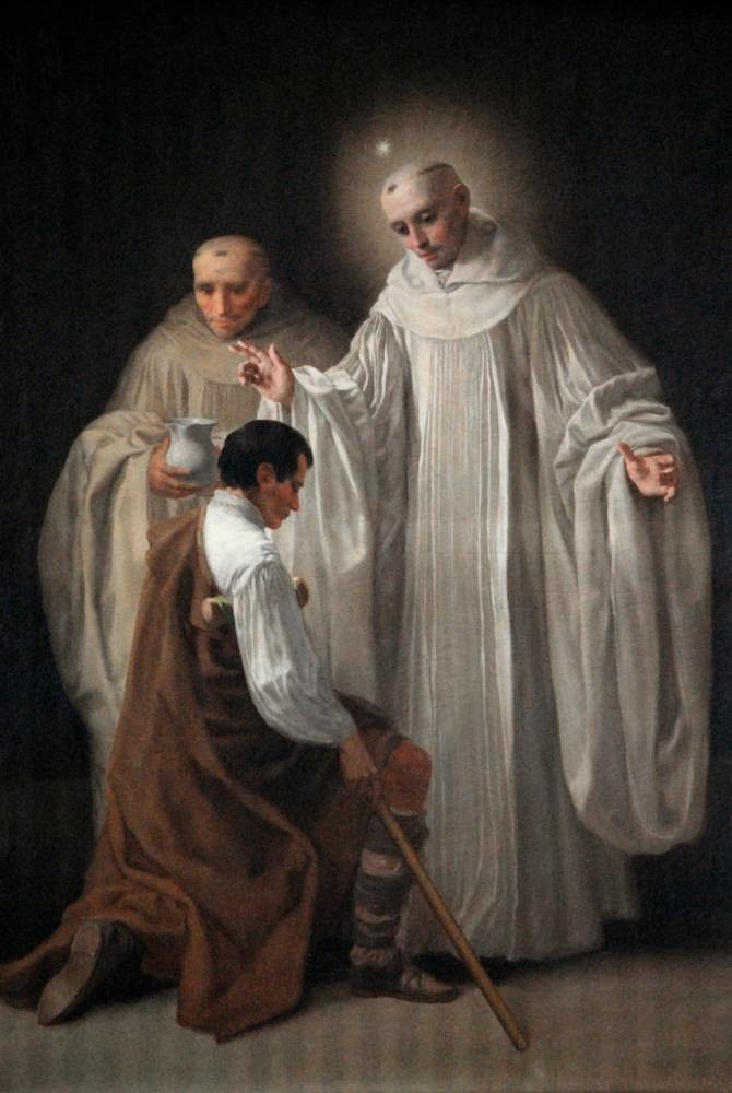 La obra representa a San Bernardo de Claraval curando a un tullido o cojo.